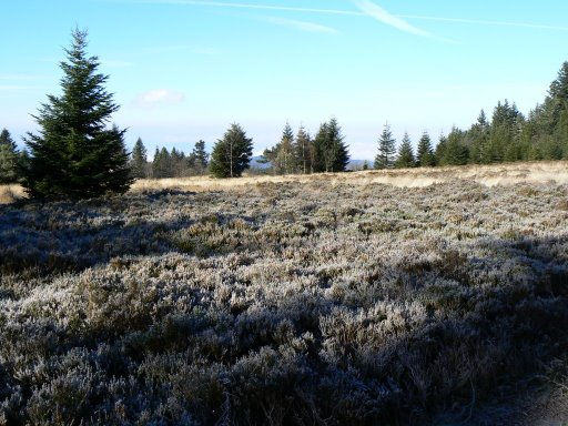 (fr) Landes à callunes (Calluna vulgaris) dans le Forez (Rhône-Alpes-Auvergne) (en) Calluna vulgaris in Forez (mountain of France's Central mountain)